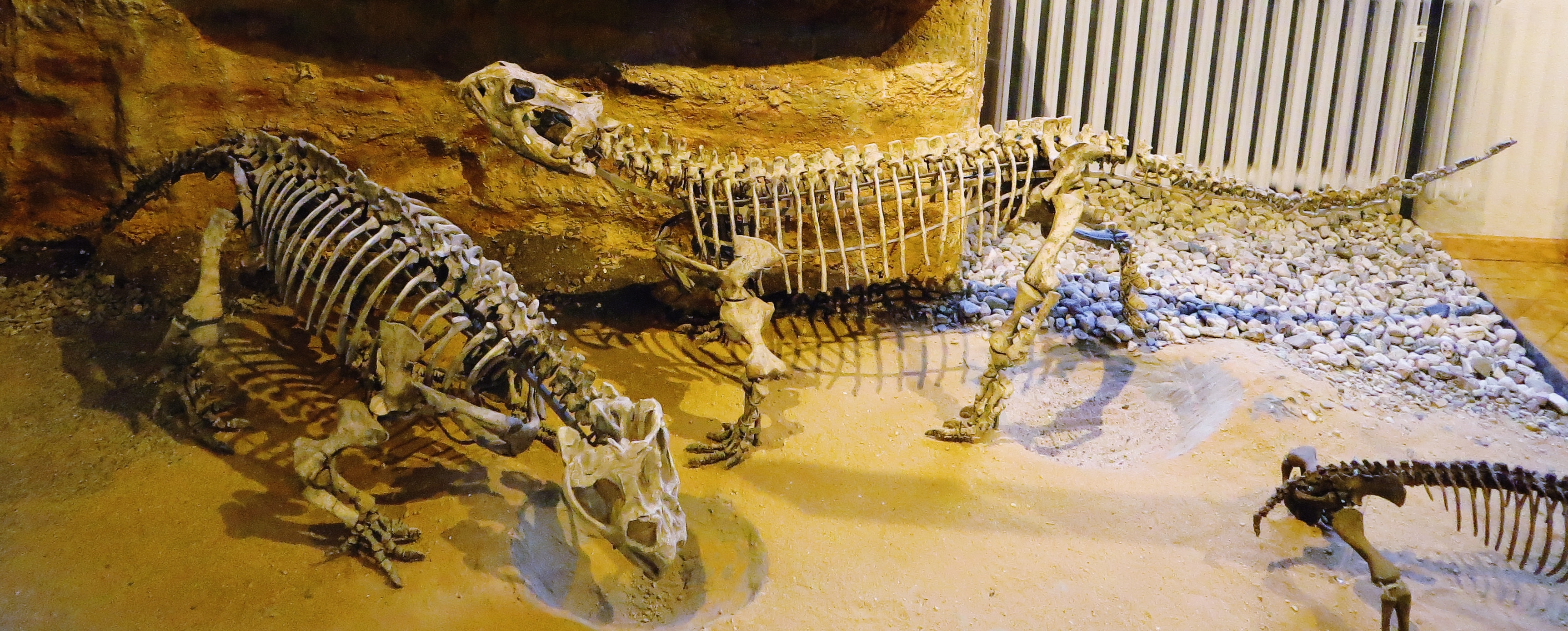 Fossil of Stenaulorhynchus, an extinct rhynchosaur- Took the picture at Museum of Paleontology, Tuebingen